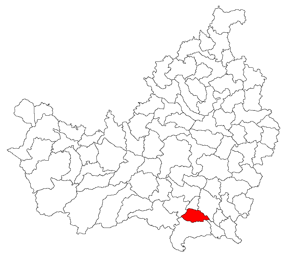 Comuna Mihai Viteazu, Cluj